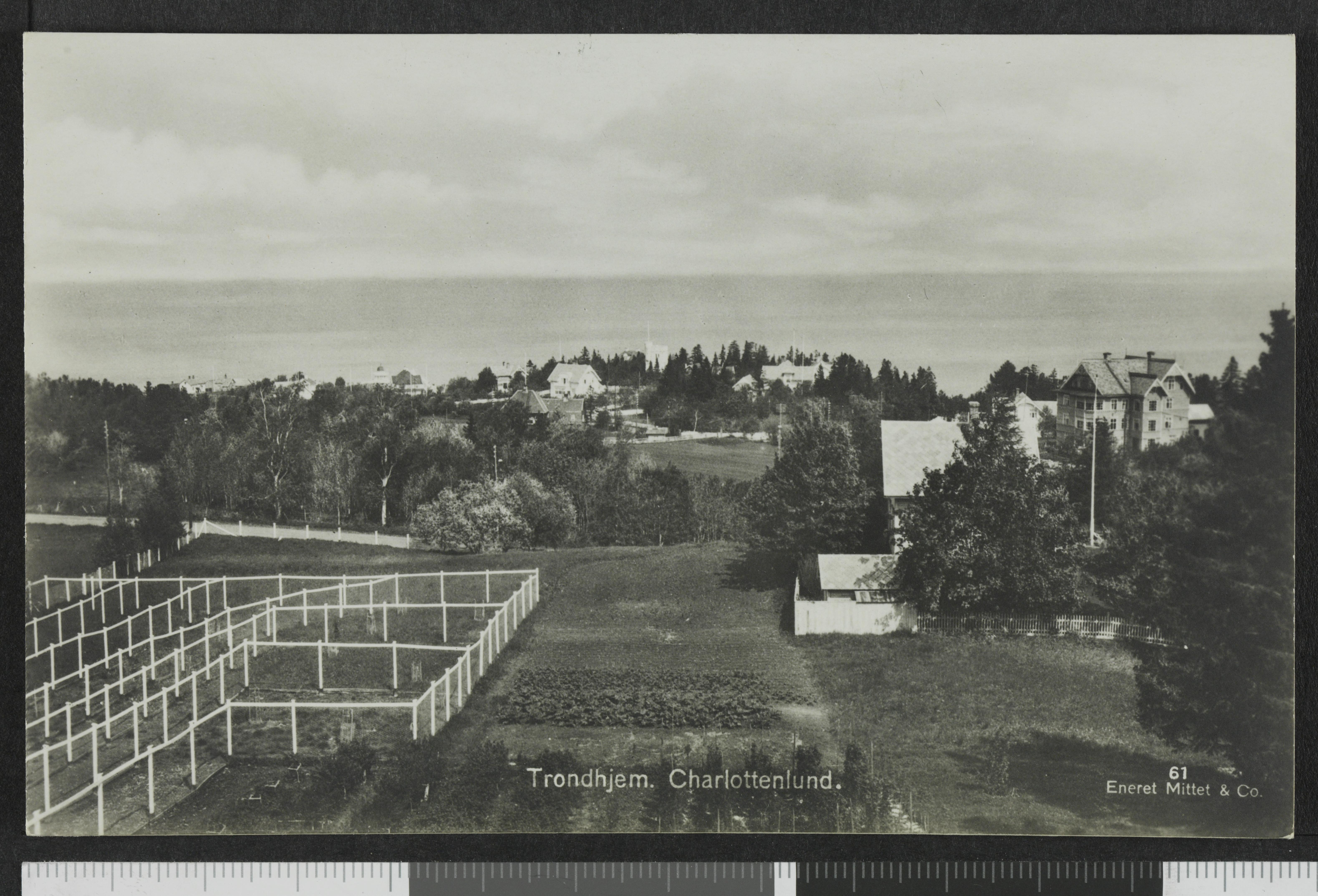 Bildet er hentet fra Nasjonalbibliotekets bildesamling Charlottenlund, Trondheim, Sør Trøndelag